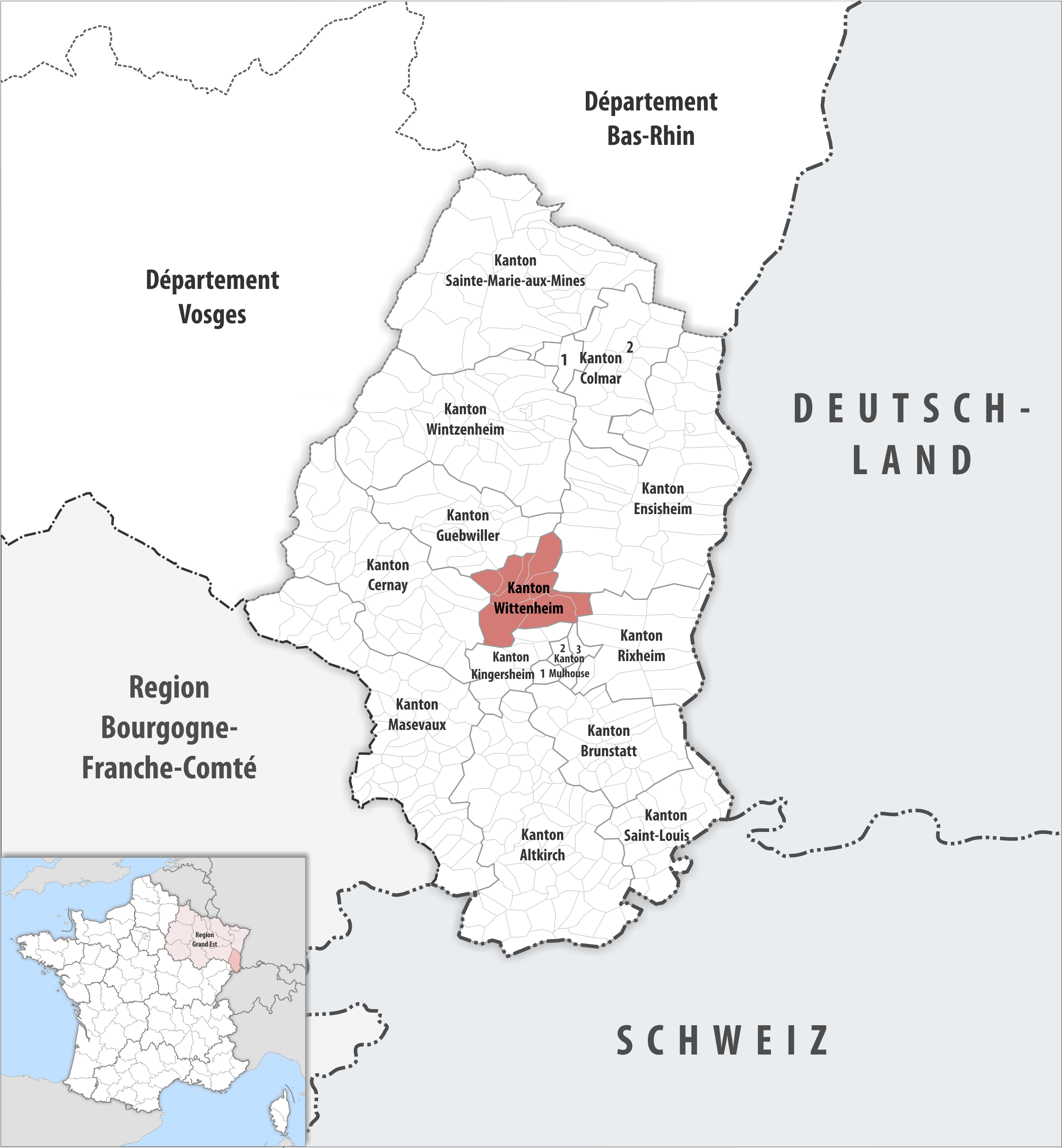 Lage des Kantons Wittenheim